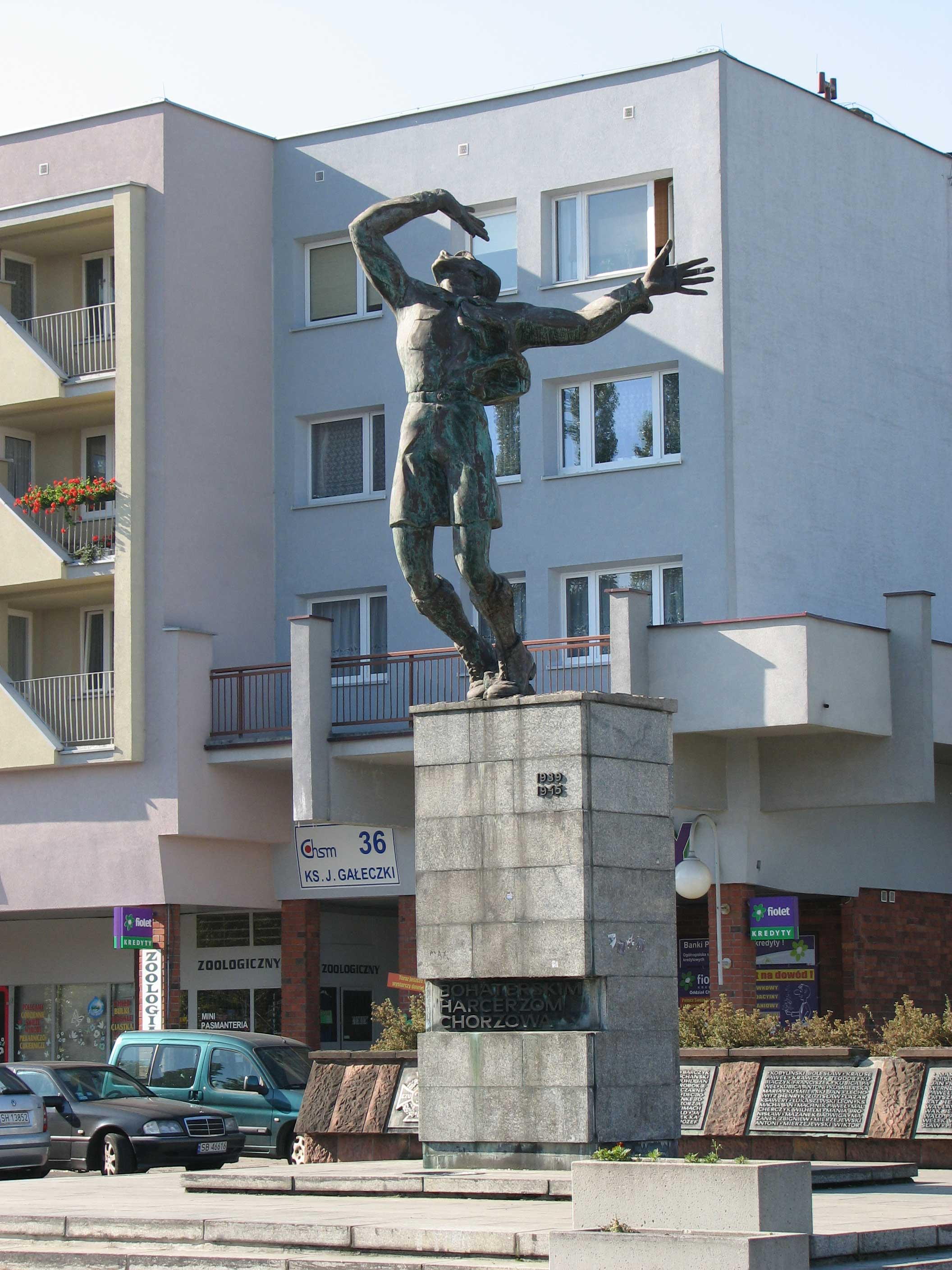 Pomnik ku czci bohaterskich harcerzy Chorzowa poległych w latach 1939-45 w Chorzowie Klimzowcu na Górnym Śląsku